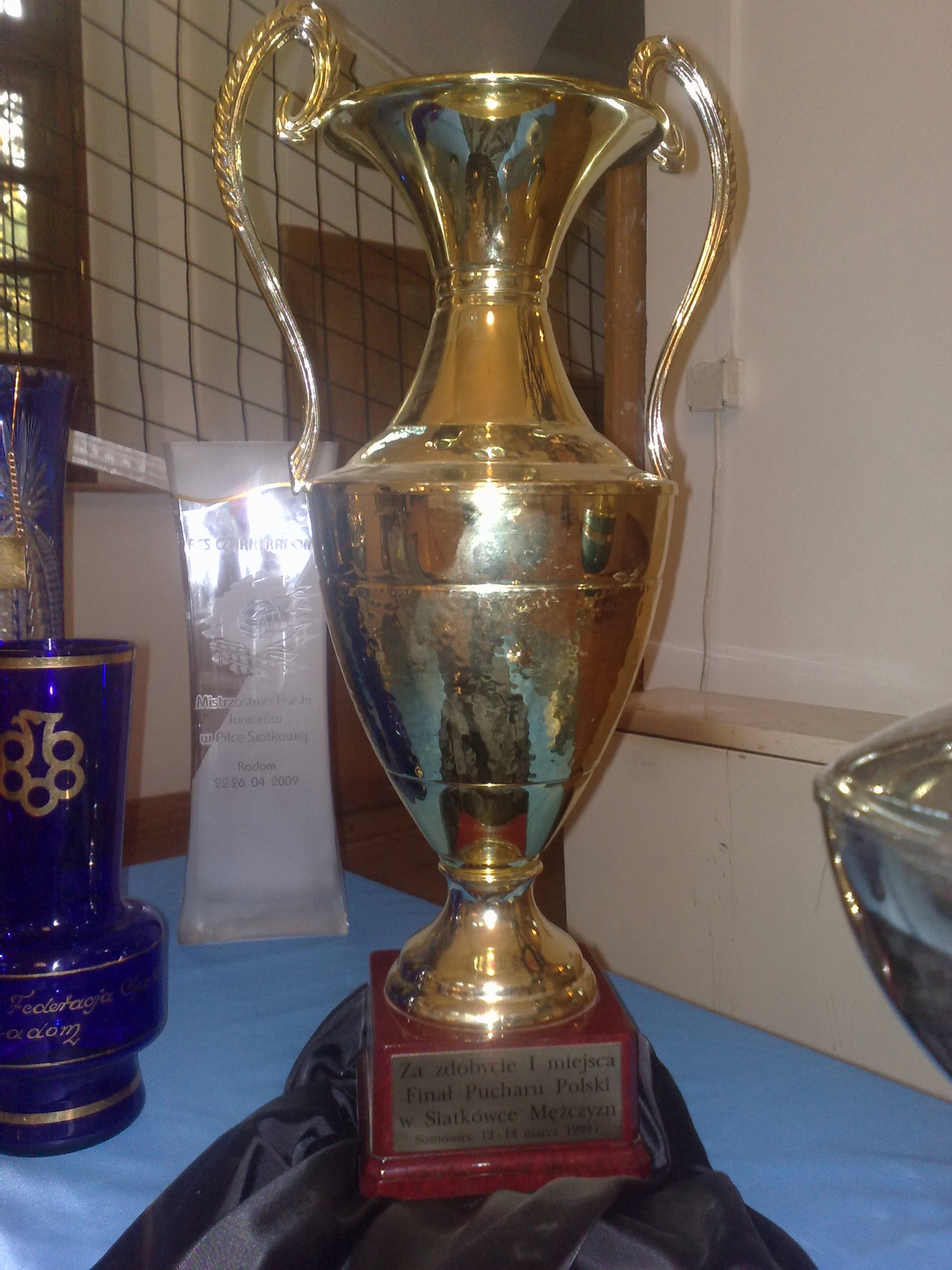 Czarni Radom - Poland Cup 1999